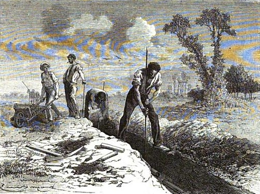 Ouvriers posant des tuyaux de drainage. Les merveilles de la science, volume 3, 1869